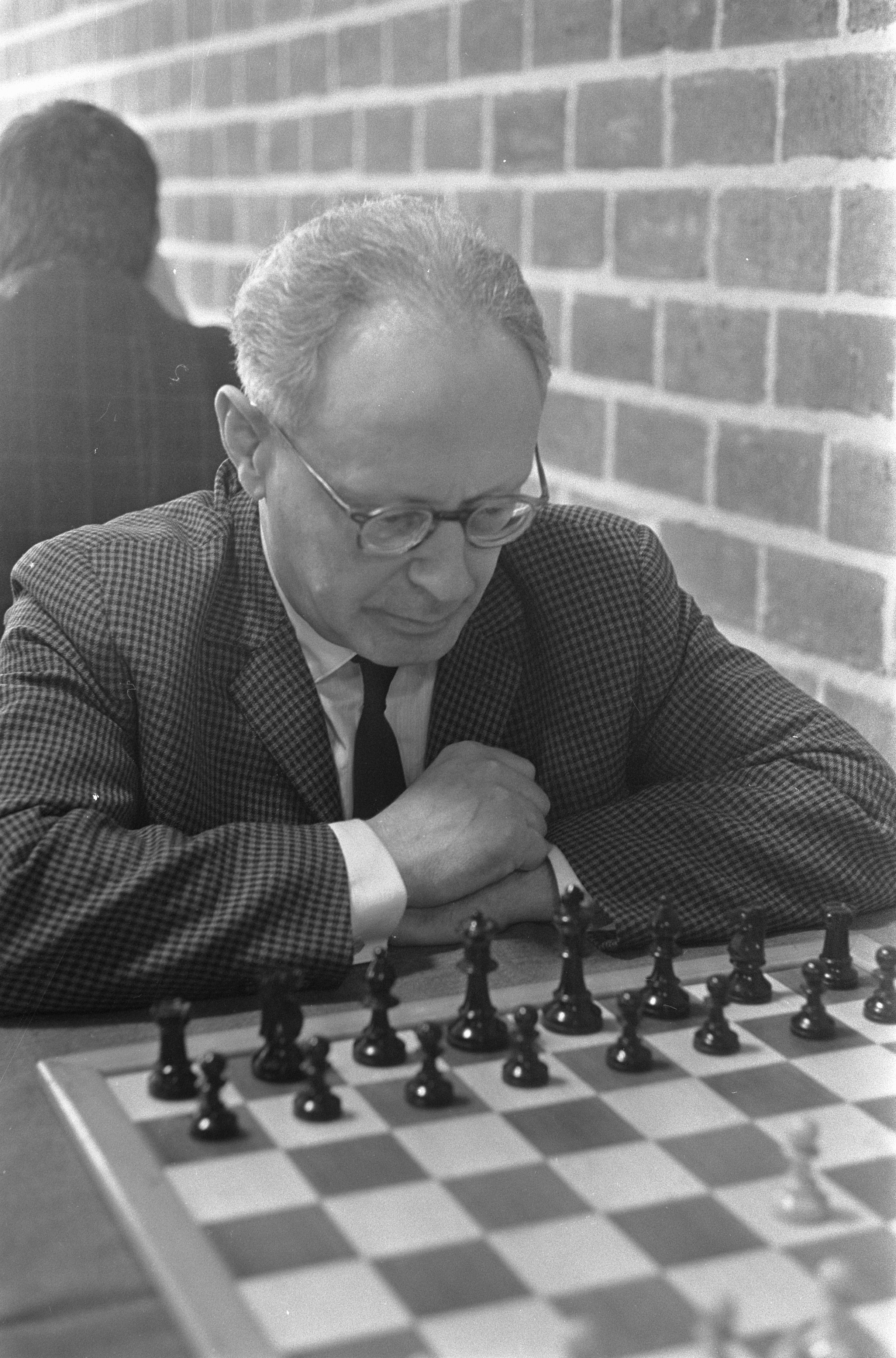 Collectie / Archief : Fotocollectie Anefo Reportage / Serie : [ onbekend ] Beschrijving : Hoogoven Schaaktoernooi Botwinnik Datum : 14 januari 1969 Trefwoorden : schaken, toernooien Fotograaf : Koch, Eric / Anefo Auteursrechthebbende : Nationaal Archief Materiaalsoort : Negatief (zwart/wit) Nummer archiefinventaris : bekijk toegang 2.24.01.05 Bestanddeelnummer : 922-0140